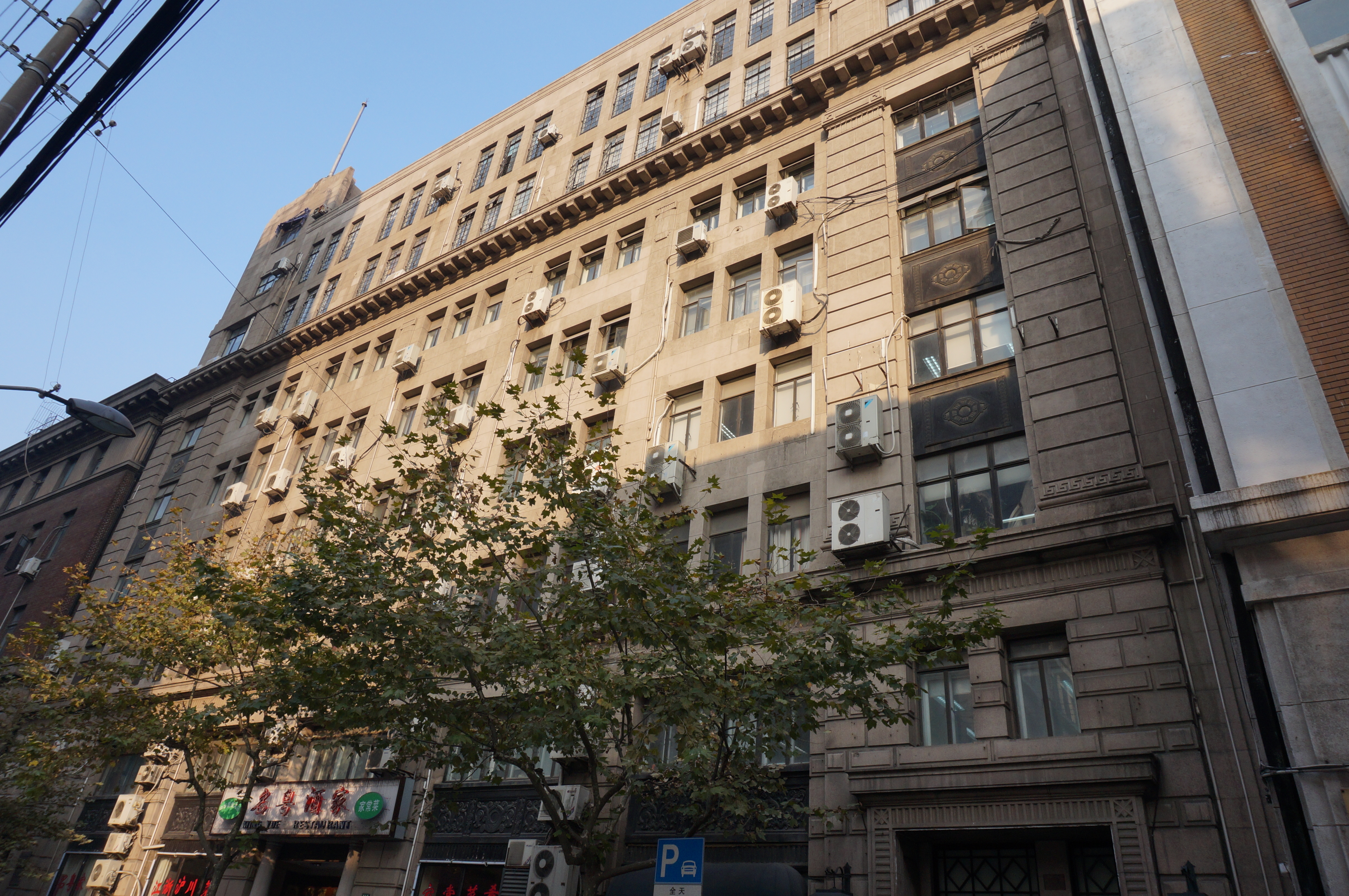 中文（中国大陆）: 新汇丰大楼